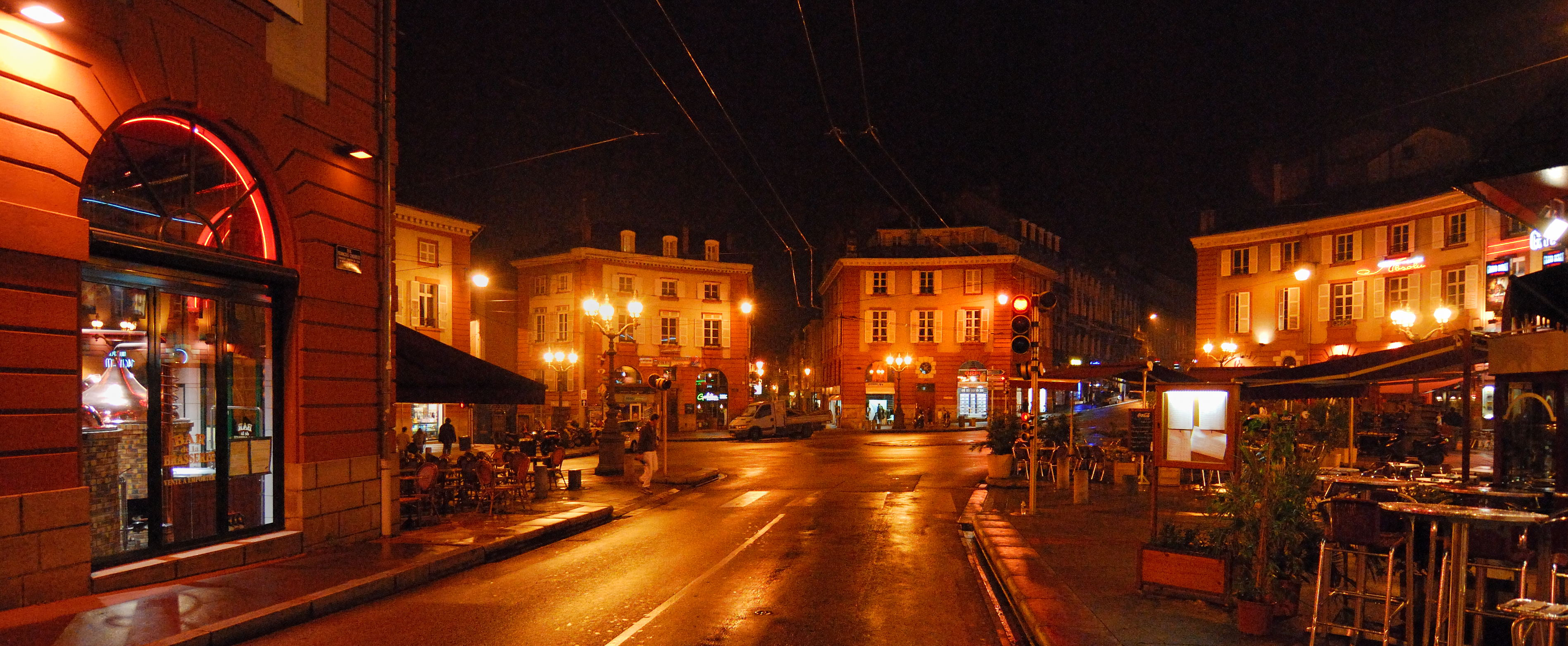 Panorama de la place Denis Dussoubs à Limoges (Haute-Vienne, France).